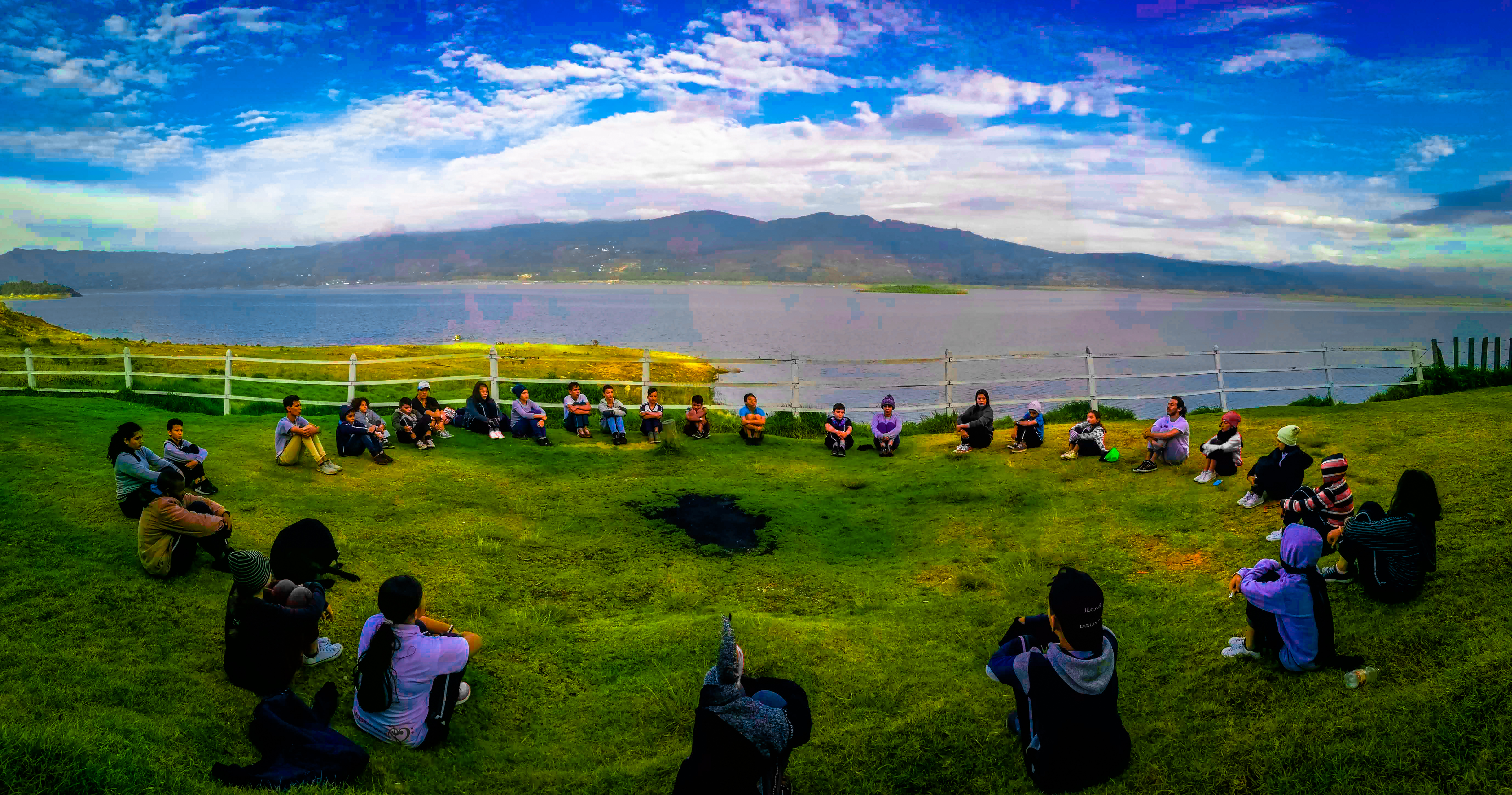 Esta fotografía fue tomada en un área protegida de Colombia con el código 511 del RUNAP.